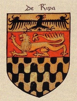 Stemma dei Baroni Ripa